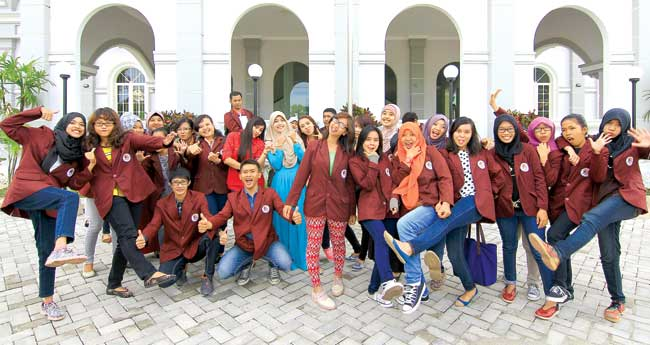 eksepresi mahasiswa STMIK Balikpapan